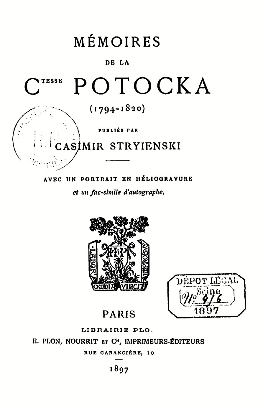 Mémoires de la comtesse Potocka, publiés par Casimir Stryienski, 1897.